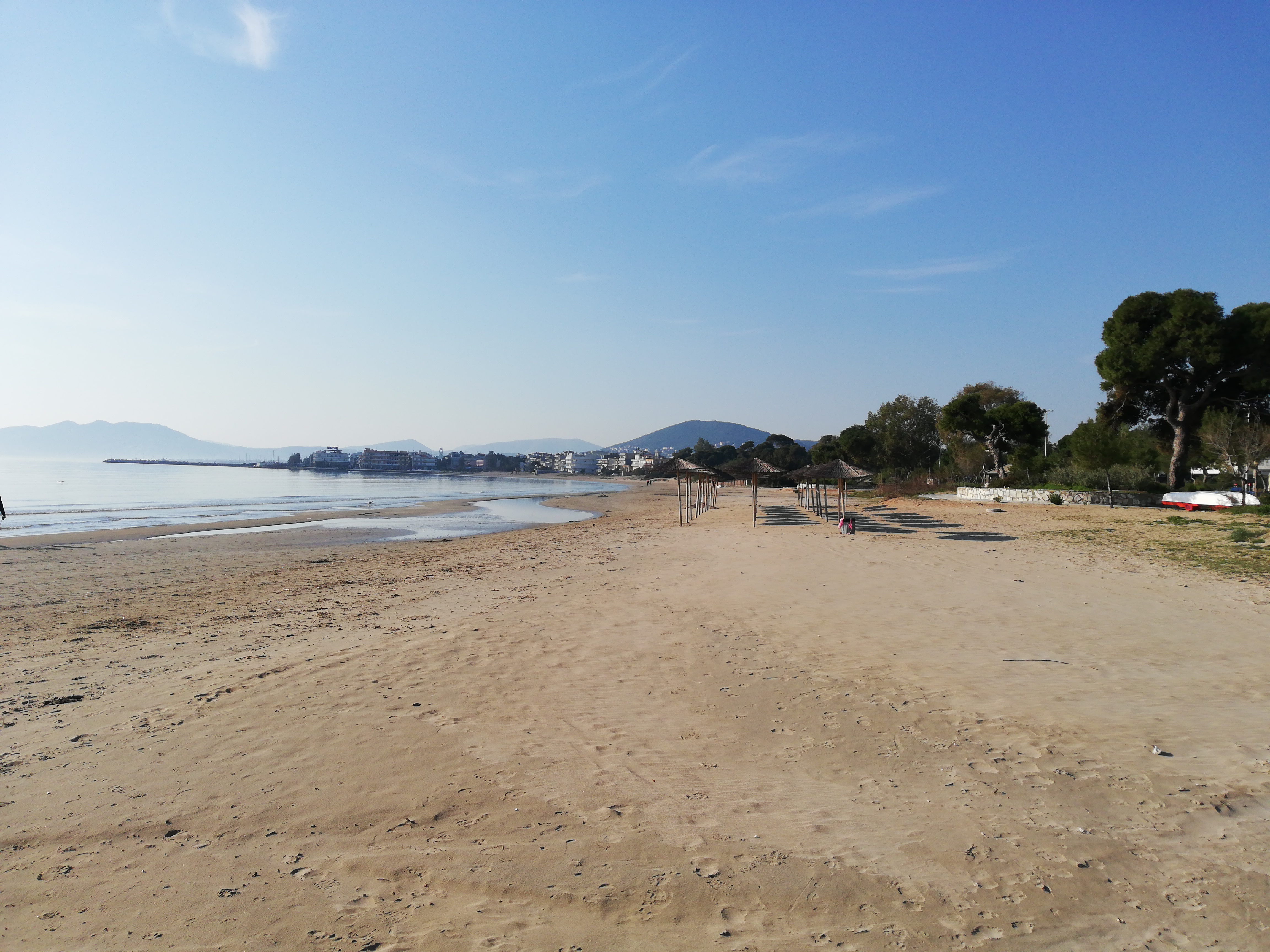 Plage à Artemida (Artémis), Attique, Grèce Environs sur carte